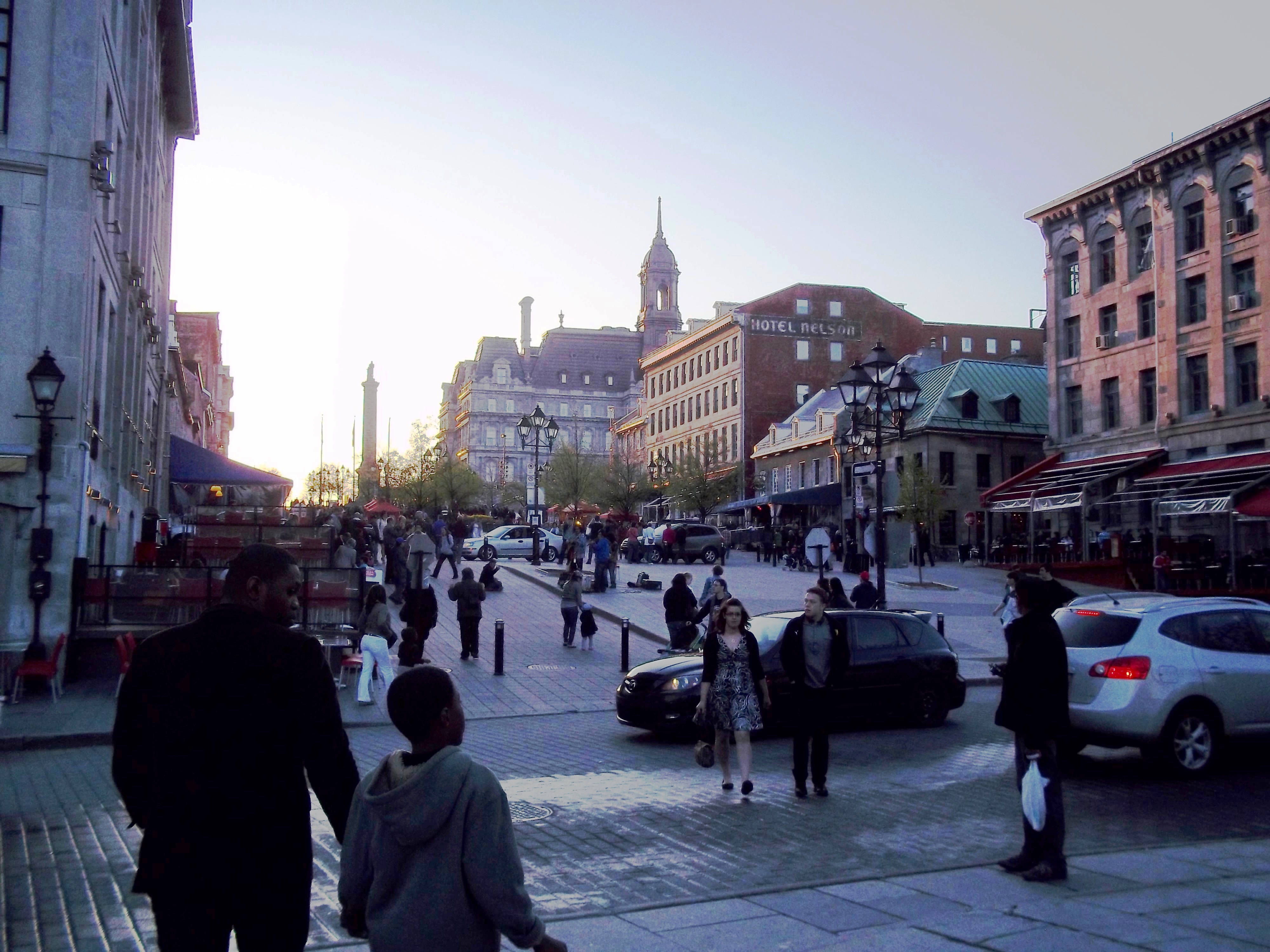 Place Jacques-Cartier, vue de la rue de la Commune, Montréal